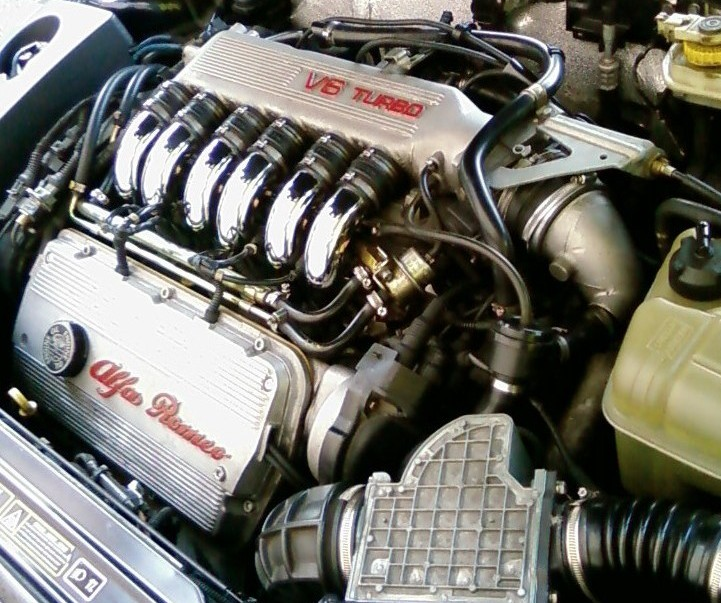 Alfa Romeo Gtv (916) V6 Turbo Lusso (Phase 2) Busso engine